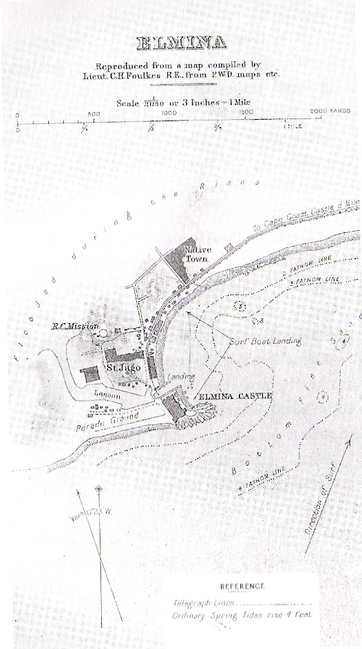 Plan of Elmina (Ghana) 1898